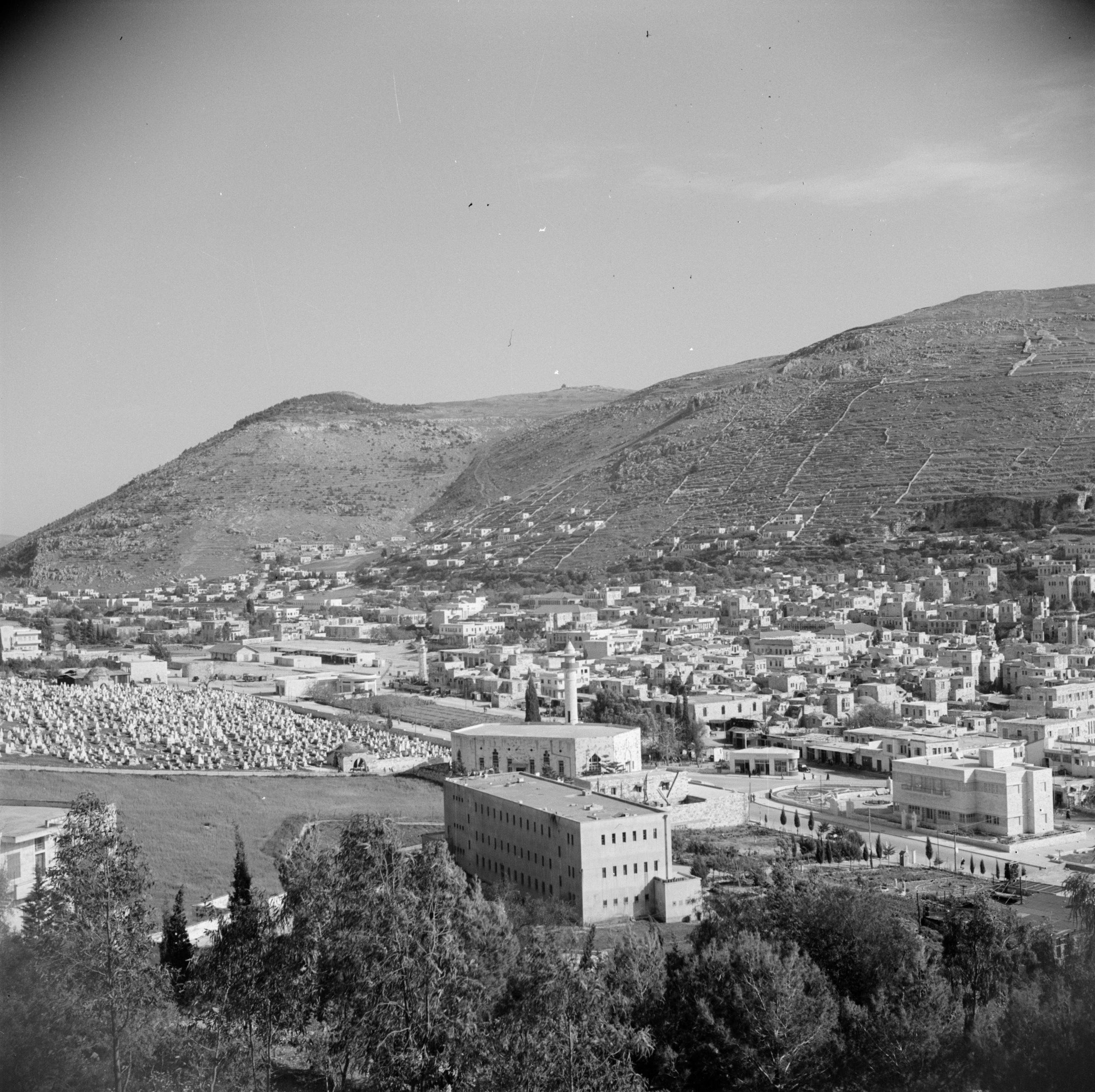 Collectie / Archief : Fotocollectie Van de Poll Reportage / Serie : Midden-Oosten 1950-1955: Jordanië Beschrijving : Zicht op Nablus. De begraafplaats en moskee Annotatie : Ten tijde van de opname lag deze plaats in Jordanië Datum : 1950 Locatie : Palestine, Jordanië, Nablus Trefwoorden : begraafplaatsen, bergen, moskeen, panorama, steden Fotograaf : Poll, Willem van de Auteursrechthebbende : Nationaal Archief Materiaalsoort : Negatief (zwart/wit) Nummer archiefinventaris : bekijk toegang 2.24.14.02 Bestanddeelnummer : 255-5566